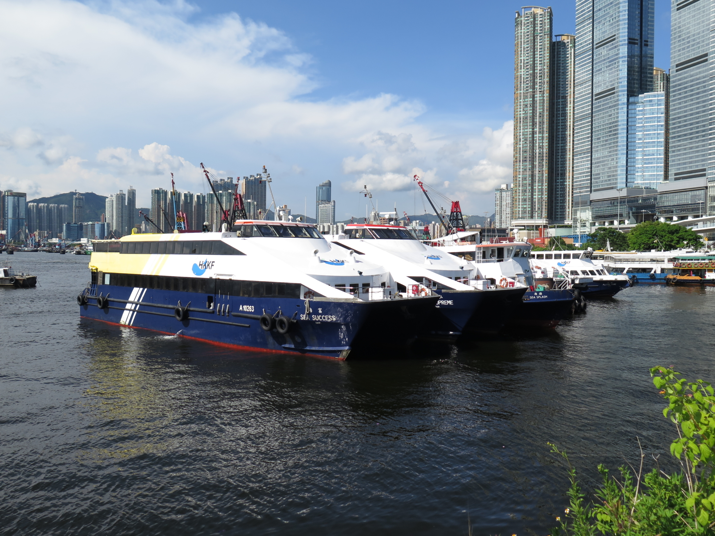 Hong Kong & Kowloon Ferry ships